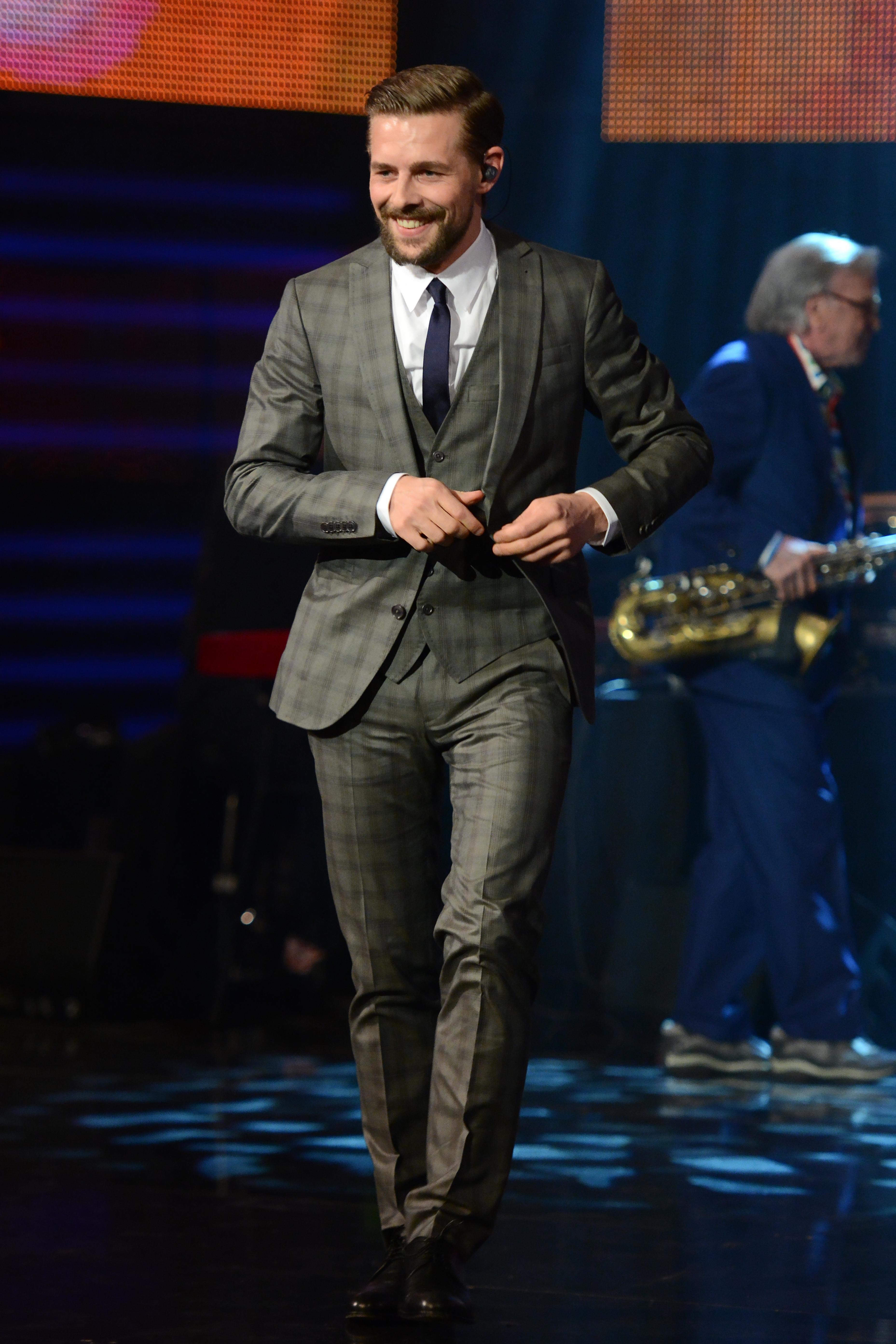 Klaas Heufer-Umlauf bei der Verleihung des Grimme-Preises 2014. (Im Hintergrund: Klaus Doldinger.)